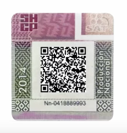 Marbete emitido por SHCP para botellas de bebidas alcohólicas.